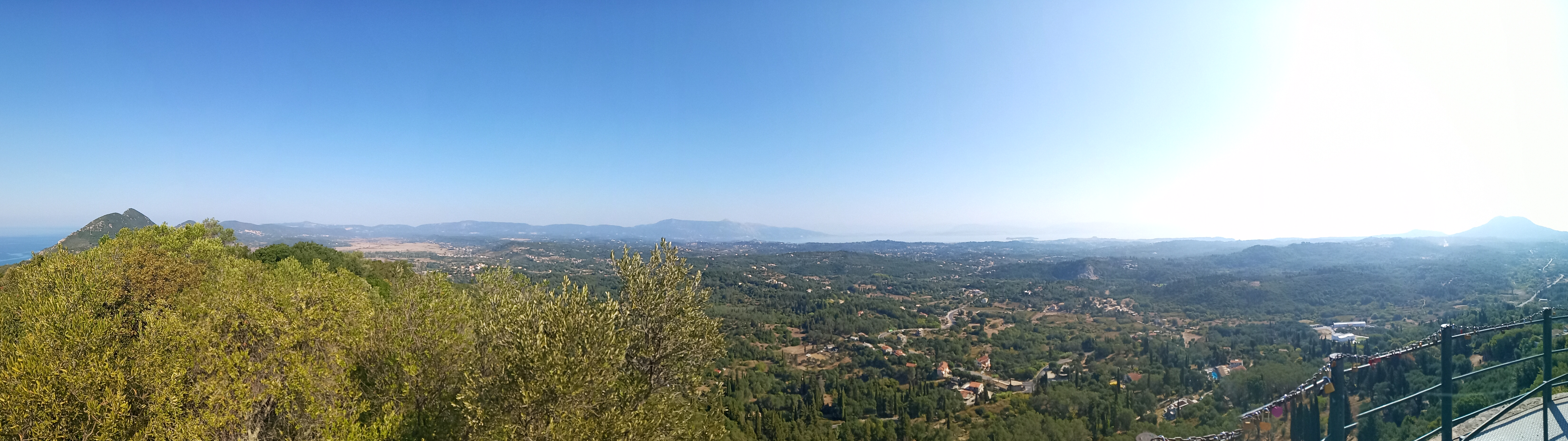 PANOрама з трону Кайзера1, Корфу Греція